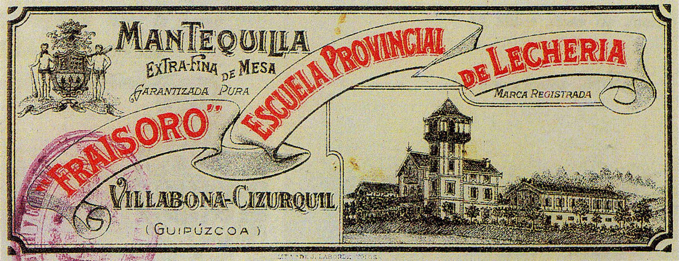 Fraisoroko esnetegiko gurinaren etiketa